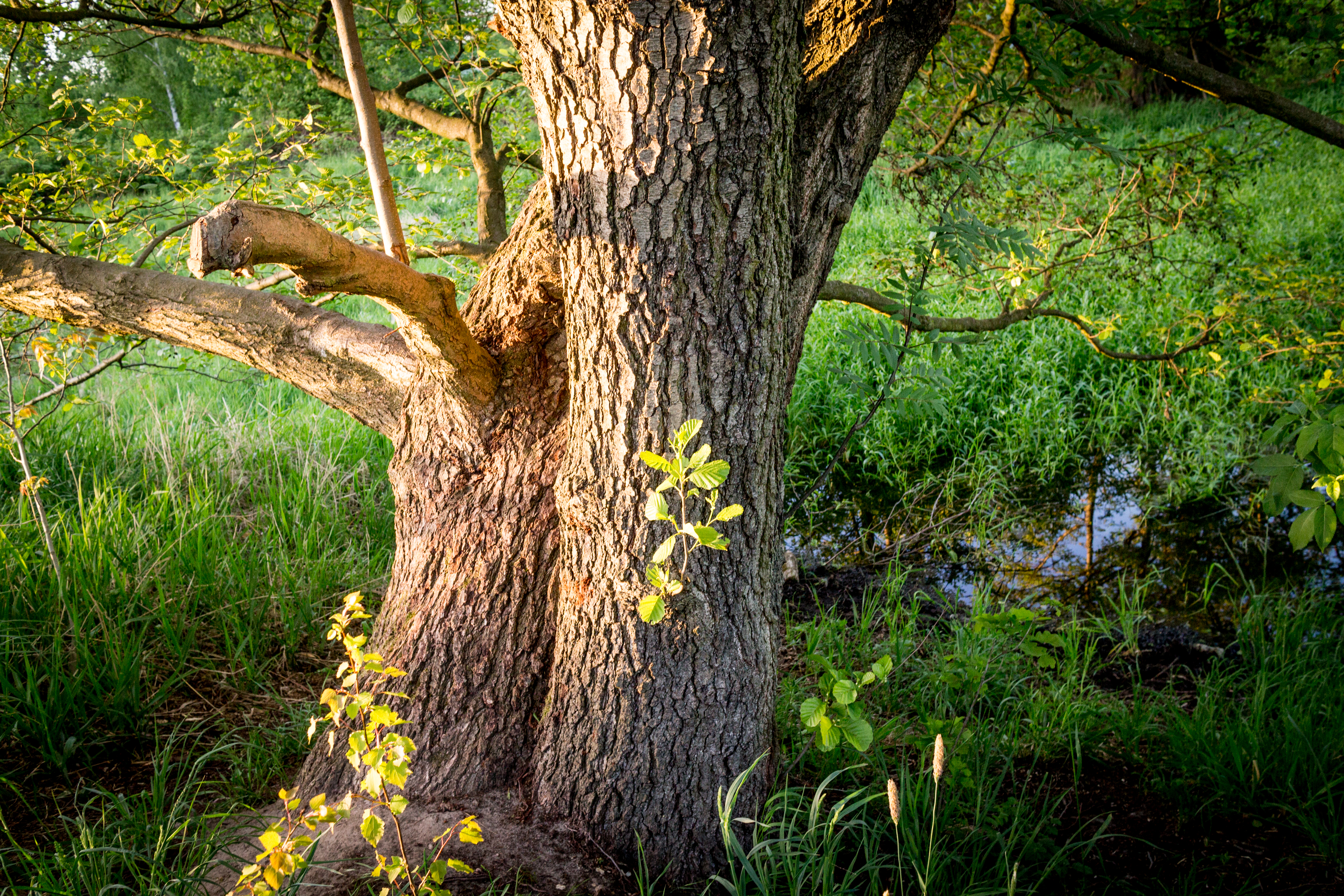 LSG Hönower Weiherkette - Baum (Erle) am Krautweiher